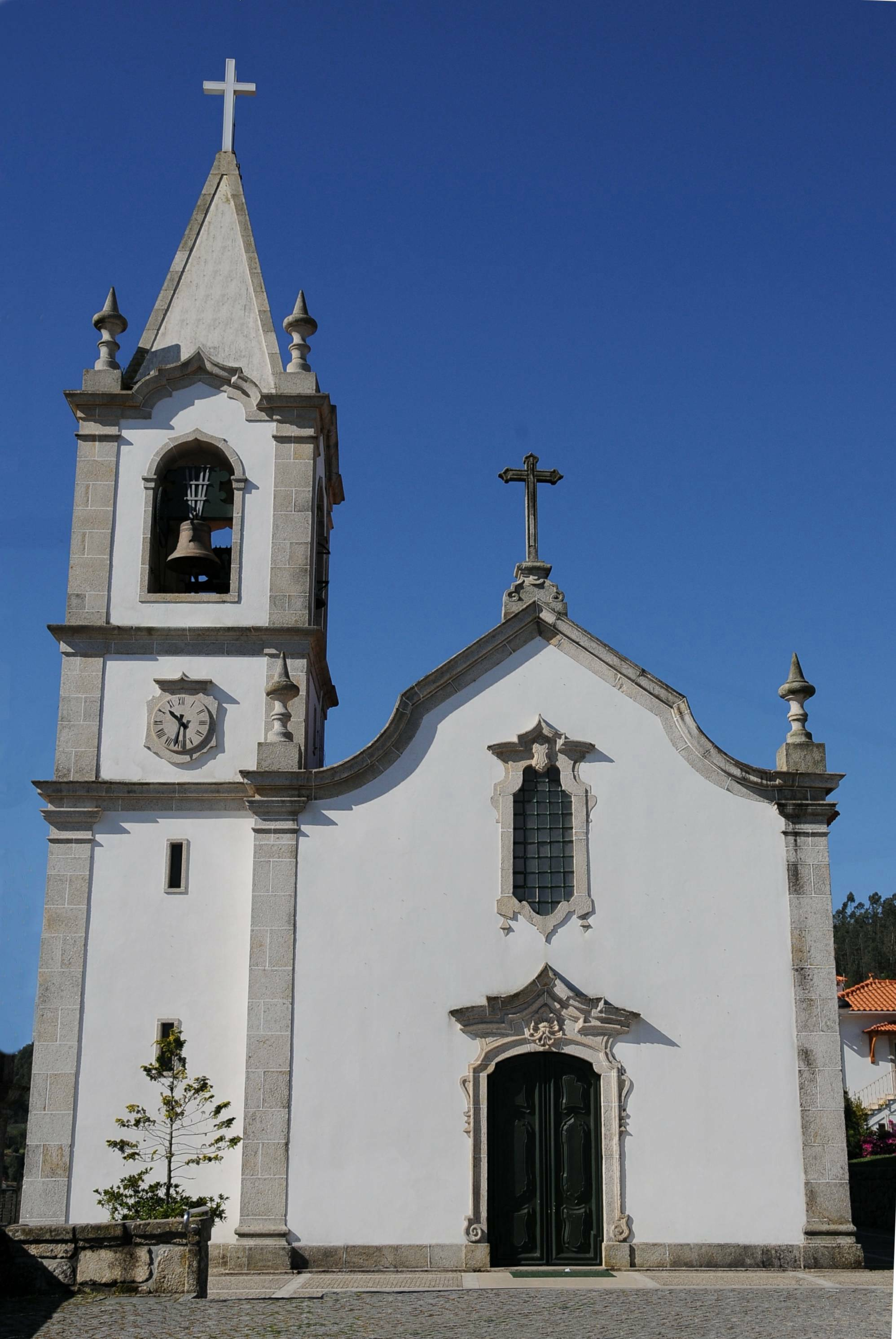 São Julião de Passos Church, in Braga, Portugal